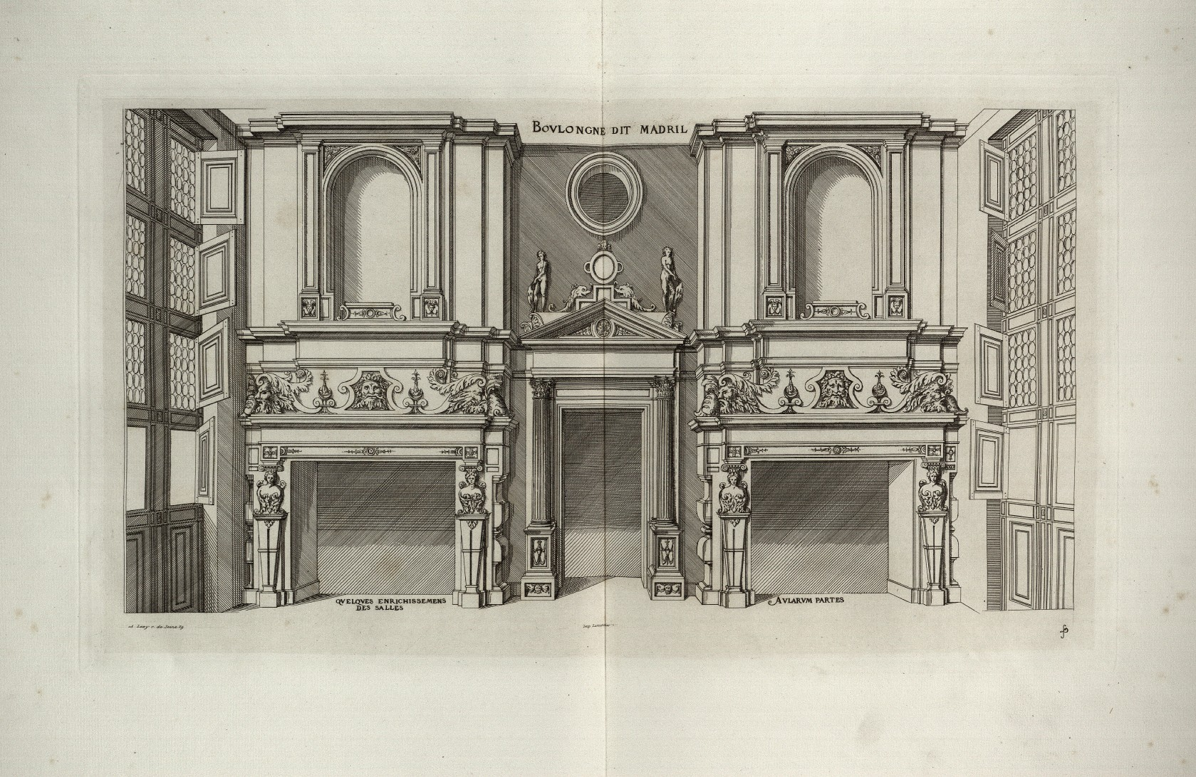 Détails intérieurs du château de Madrid. Planche tirée de l'ouvrage d'Androuet du Cerceau Les plus excellents bastiments de France